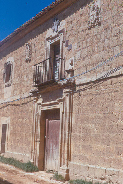 Casona de la Mayorazga - Urueña (Valladolid) - Diapositiva 48 x 48 Color